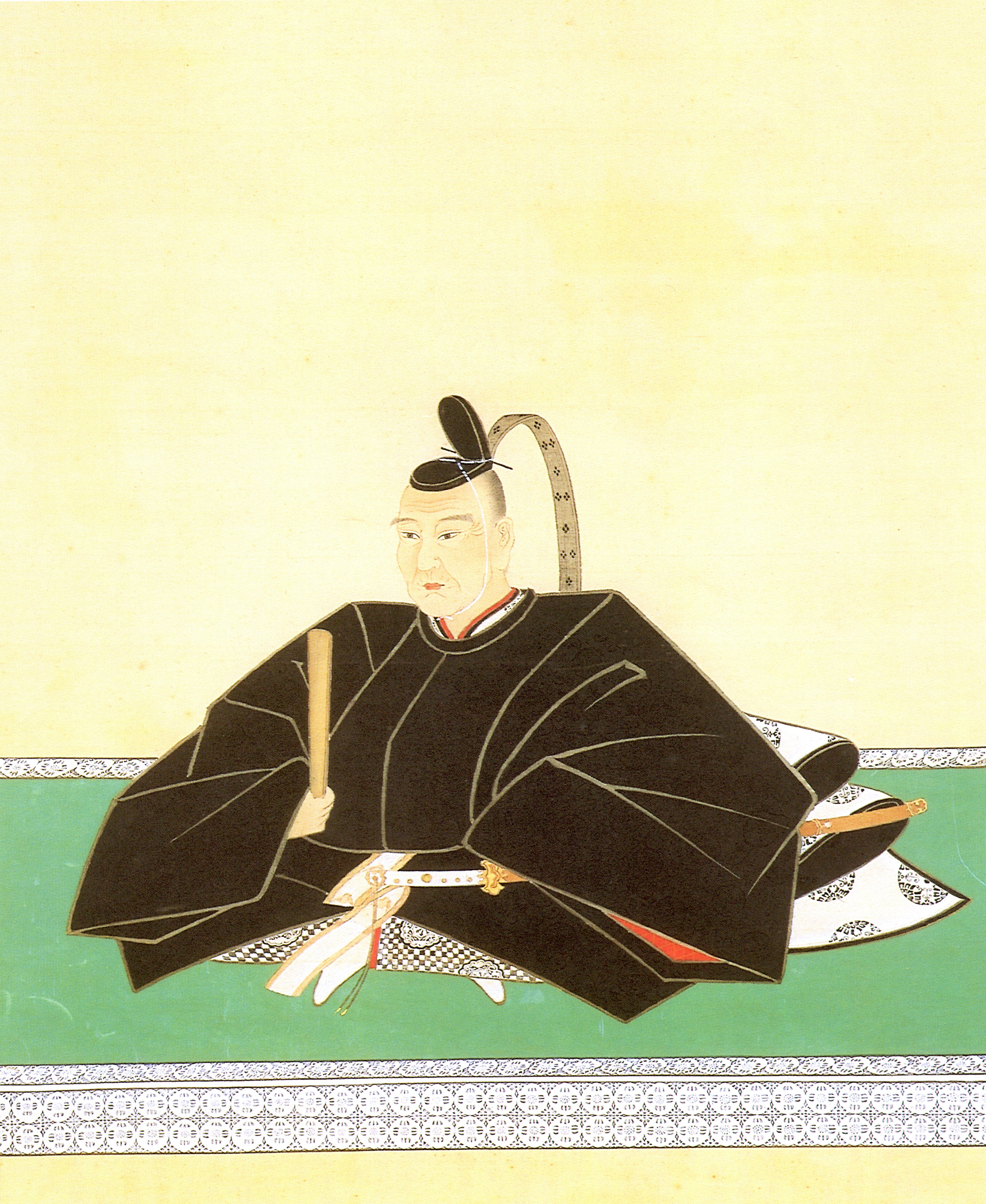 一条房家の肖像。